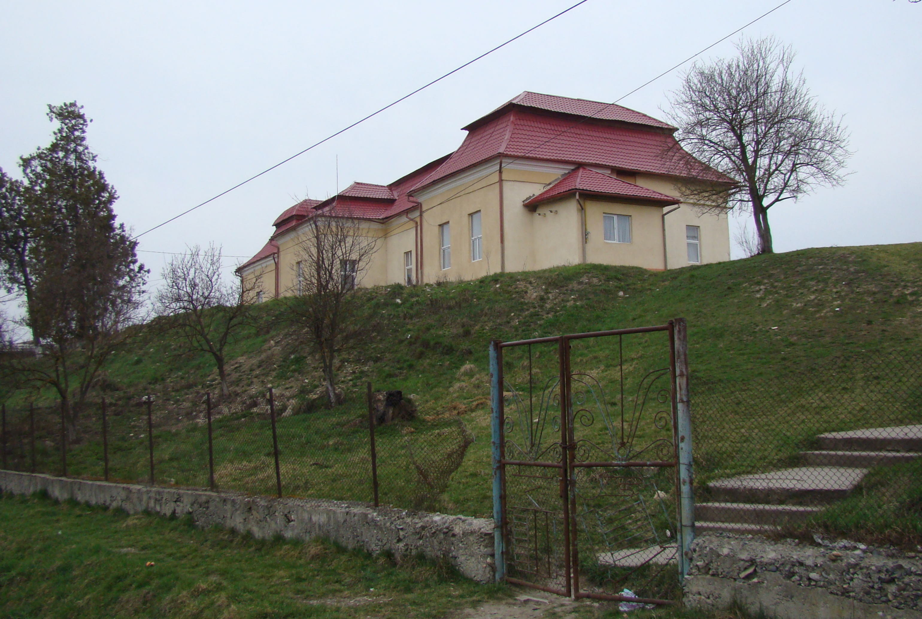 Conacul Teleki din satul Cuzdrioara; comuna Cuzdrioara, județul Cluj